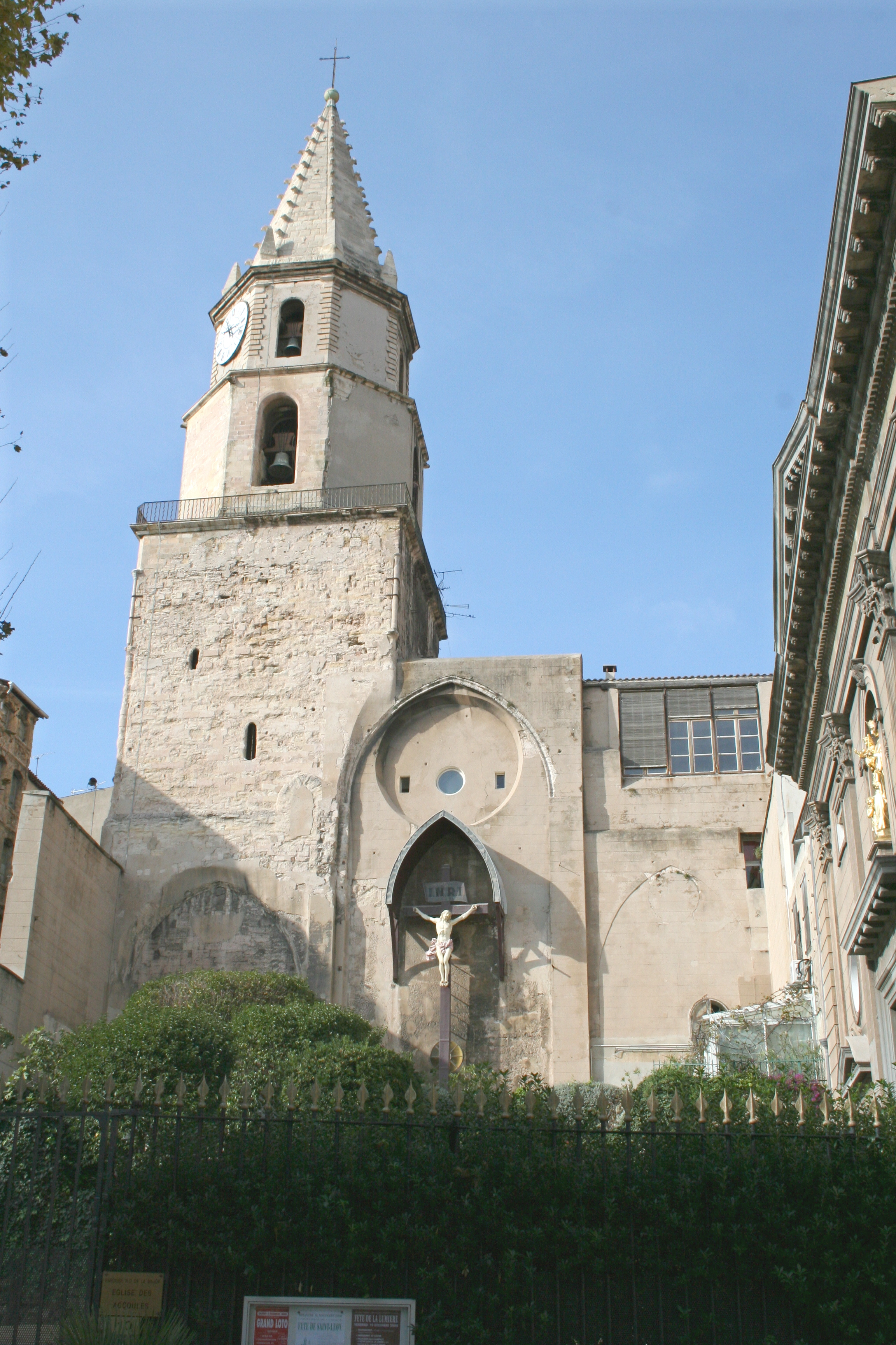 clocher de l'ancienne église des Accoules à Marseille